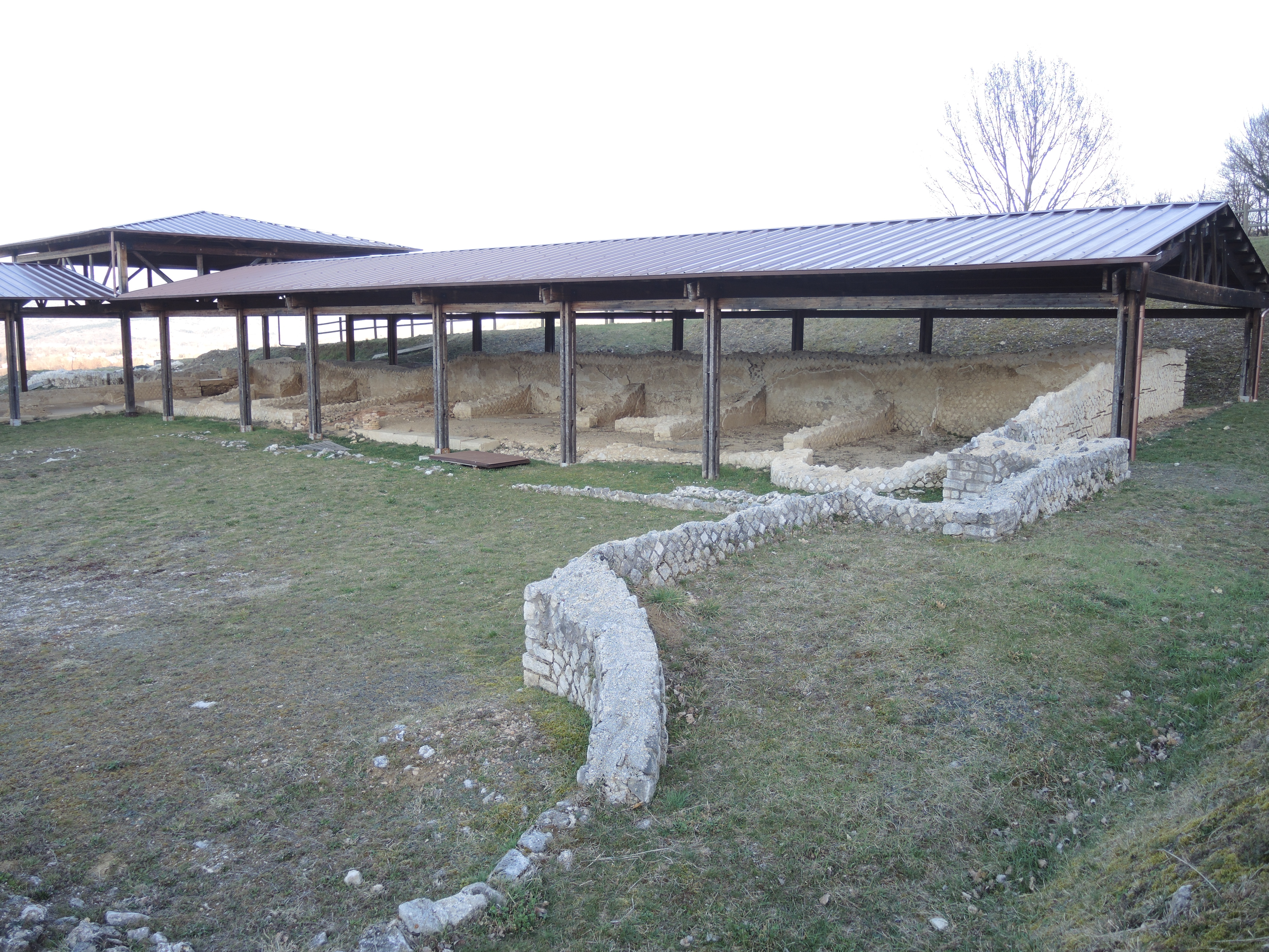 Civita di Bagno (L'Aquila): Forcona